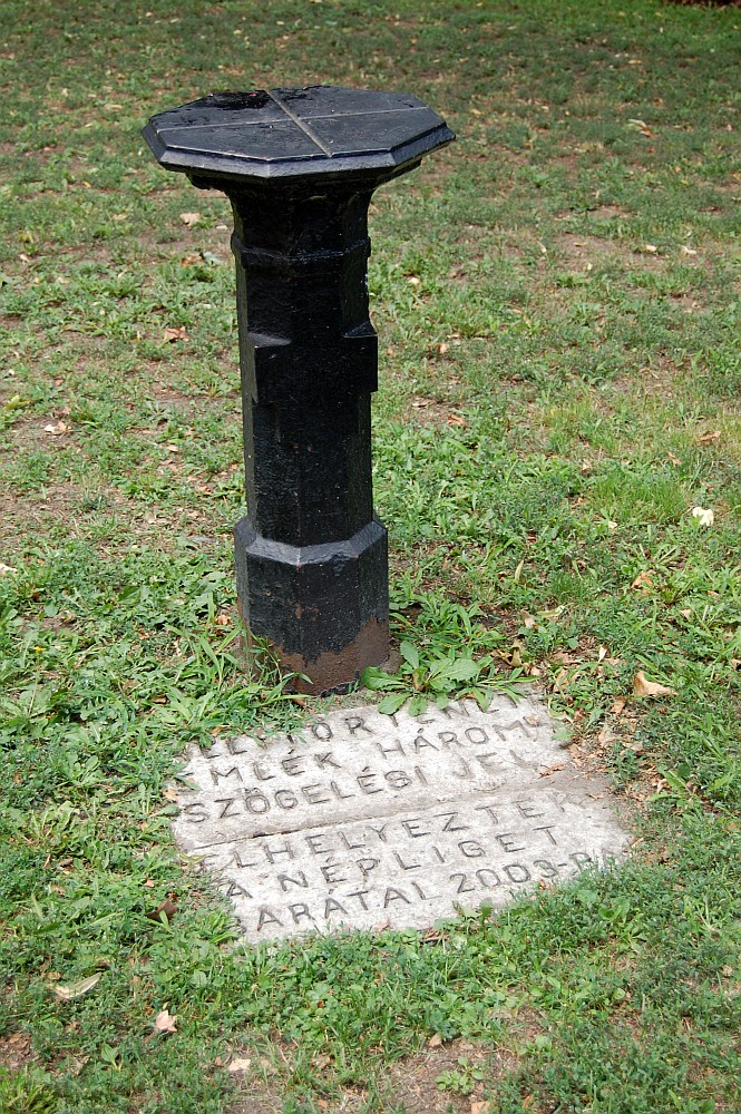 Háromszögelési jel a Népligetben. Helytörténeti emlék. Elhelyezték a Népliget barátai 2003-ban.